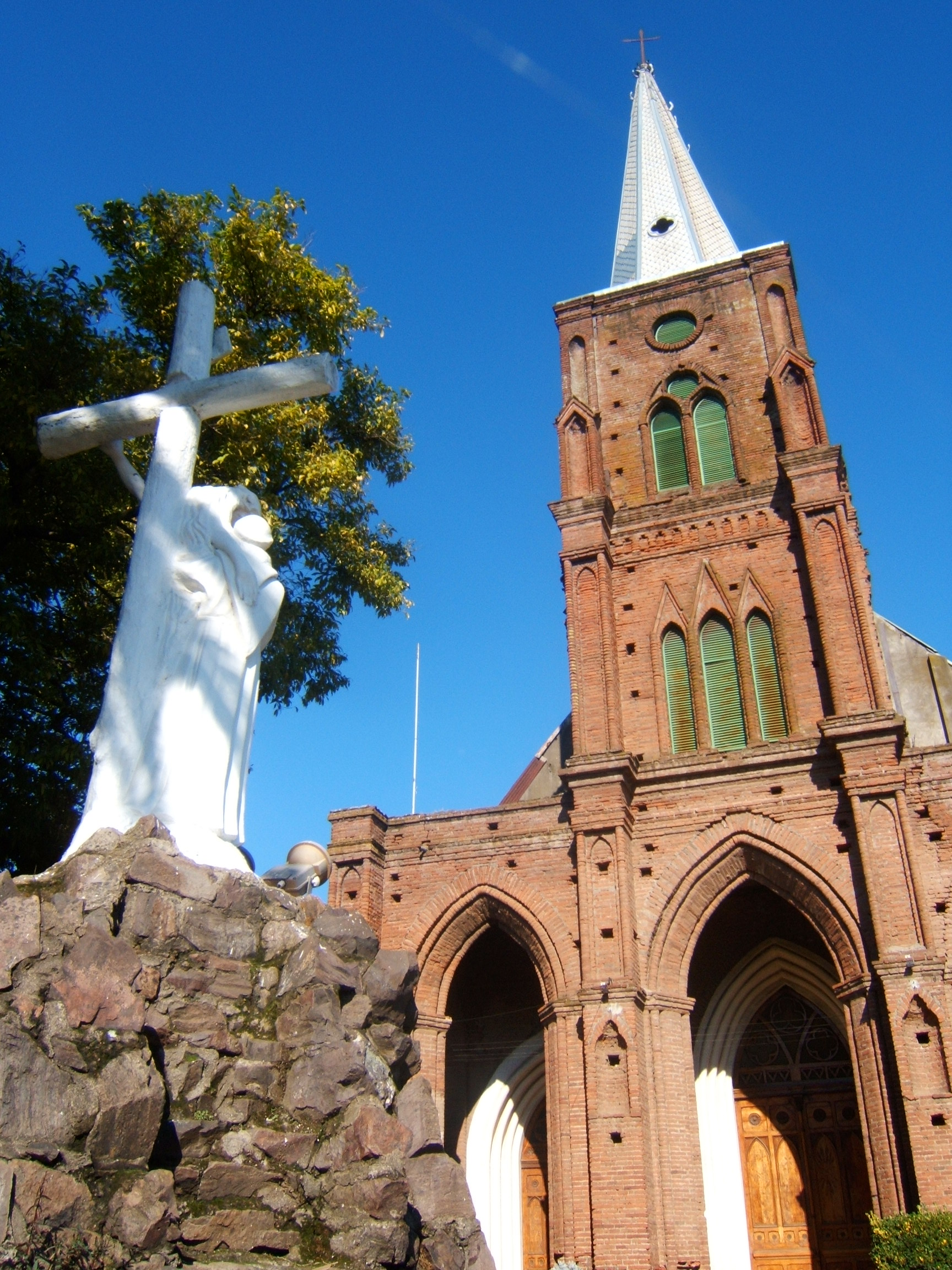 foto de 2009 This is a photo of a national monument in Chile: 381